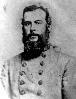 Portrait du général Alfred Mouton tué lors de la Guerre de Sécession en 1862.